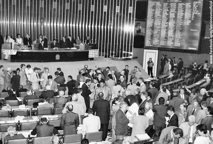 Aécio preside a Mesa durante a votação do projeto que restringe a imunidade parlamentar.